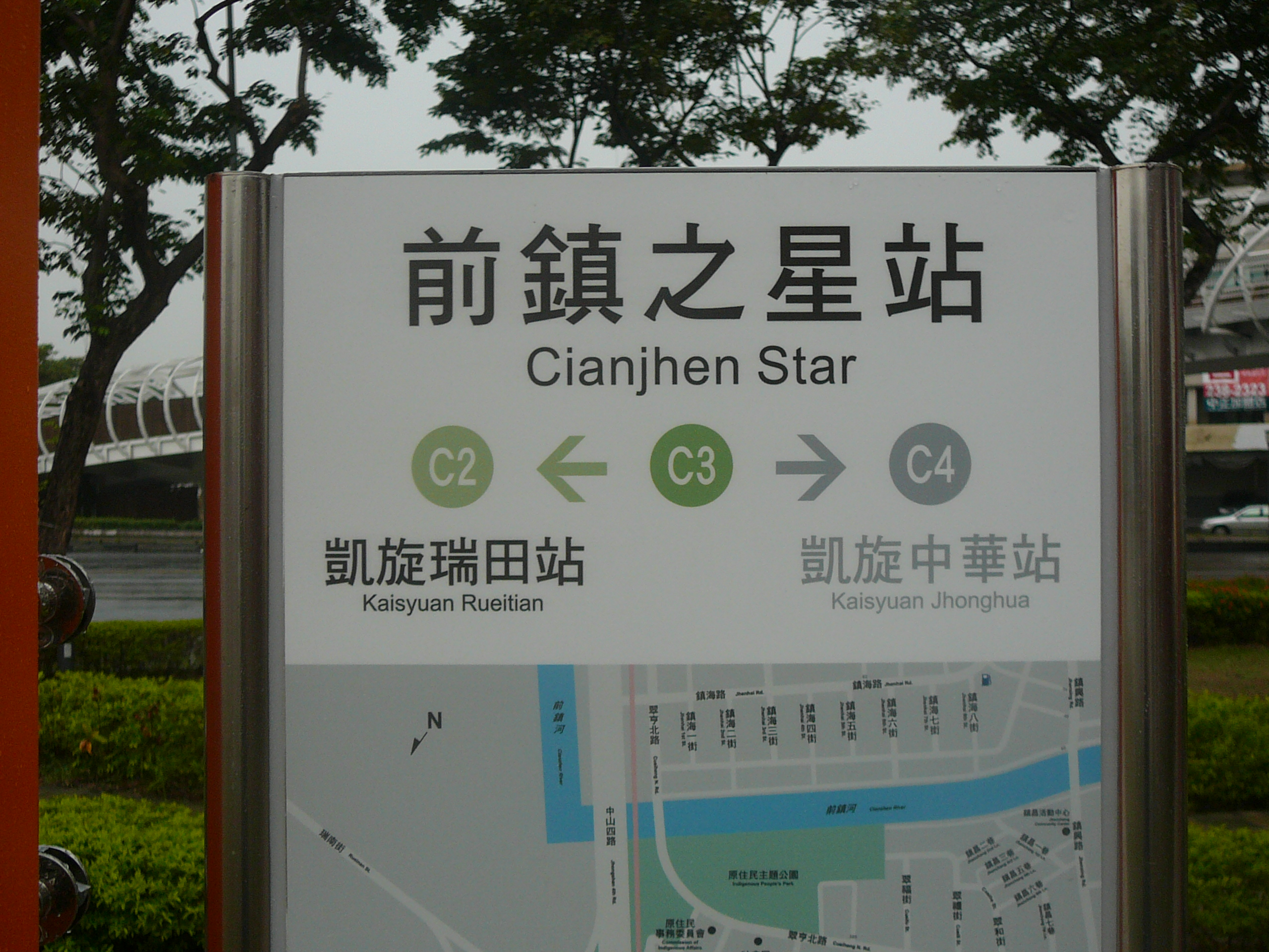 環狀輕軌前鎮之星站站名牌